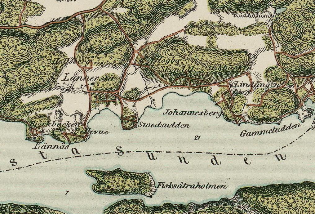 Lännersta gård och Villa Lindängen på Topografiska Corpsens karta